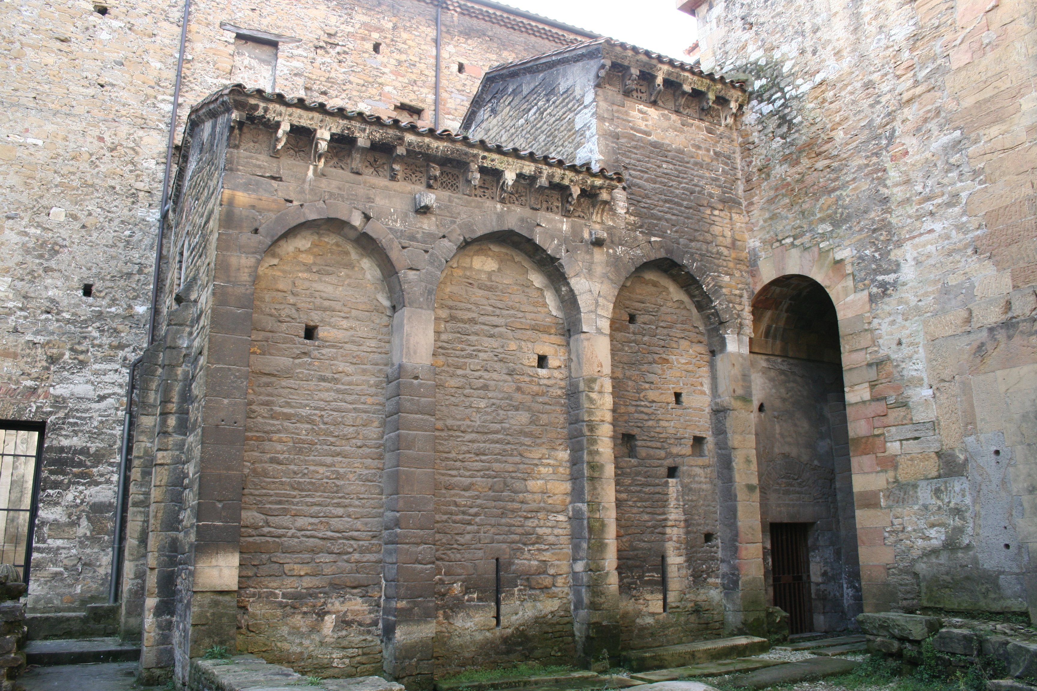 Lateral exterior de la cámara santa e Oviedo